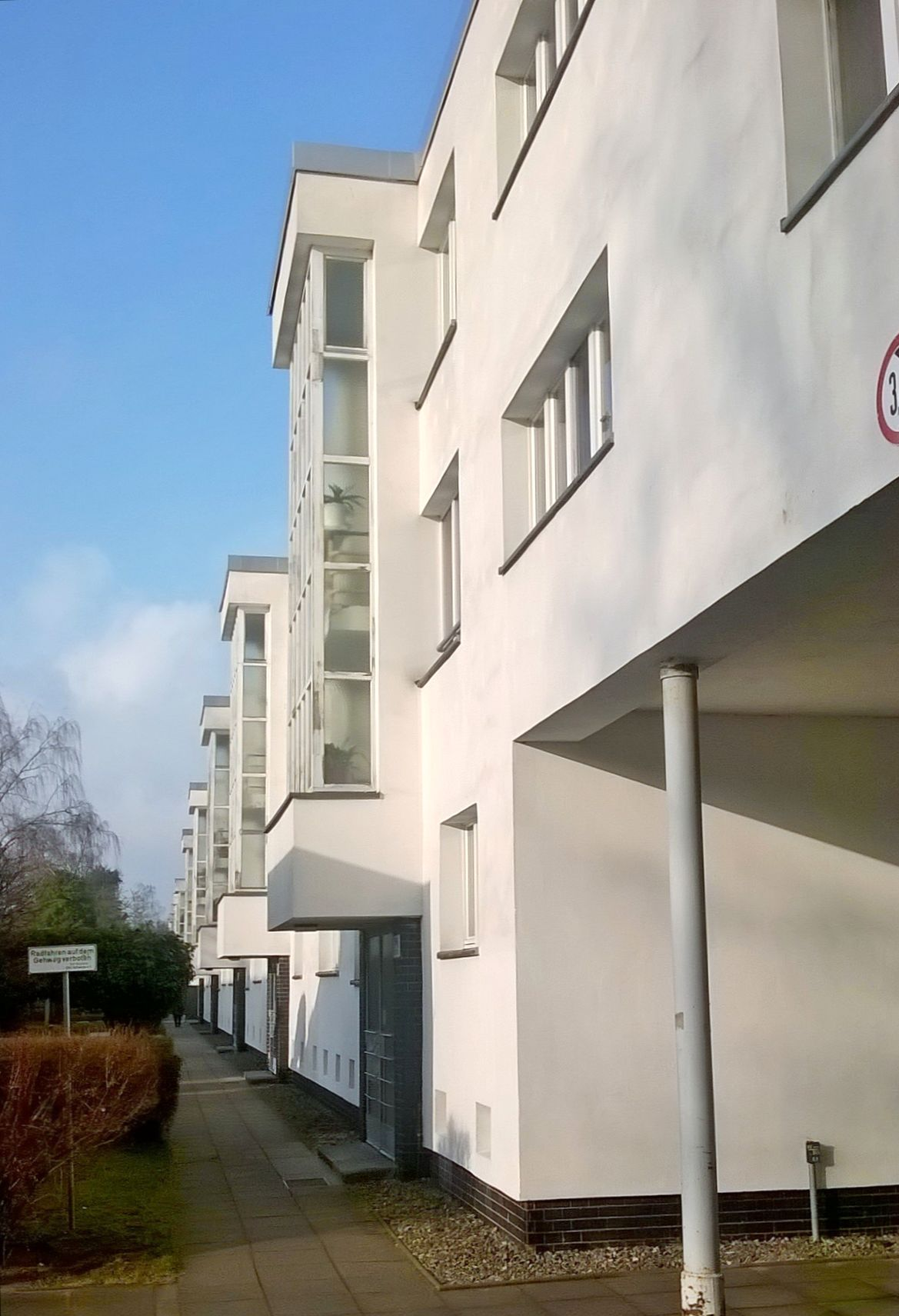 Denkmalgeschützte Siedlung Friedrich-Ebert-Ring 11-56 in Rathenow, erbaut 1928-31 von Otto Haesler